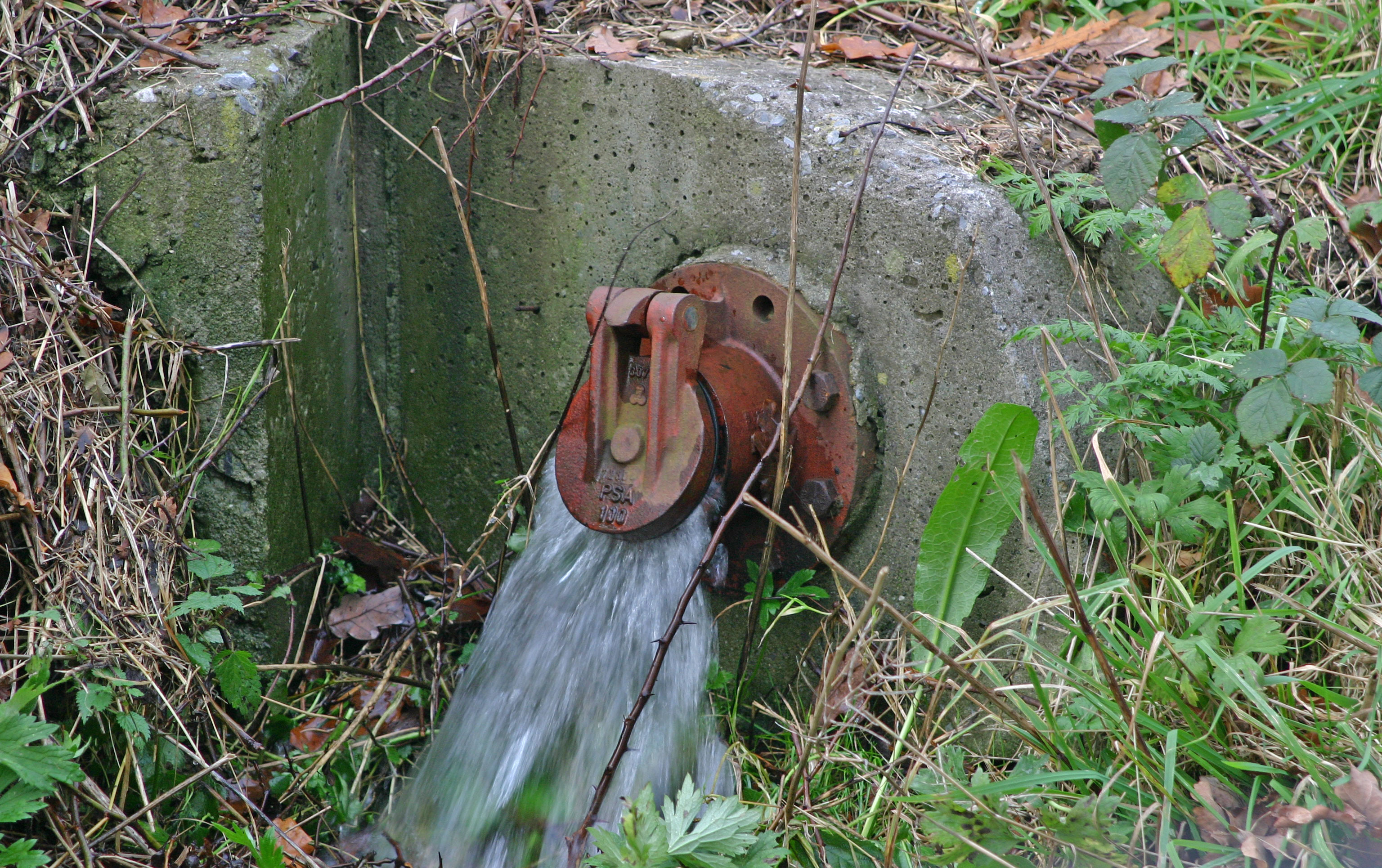 Réckschlagklapp